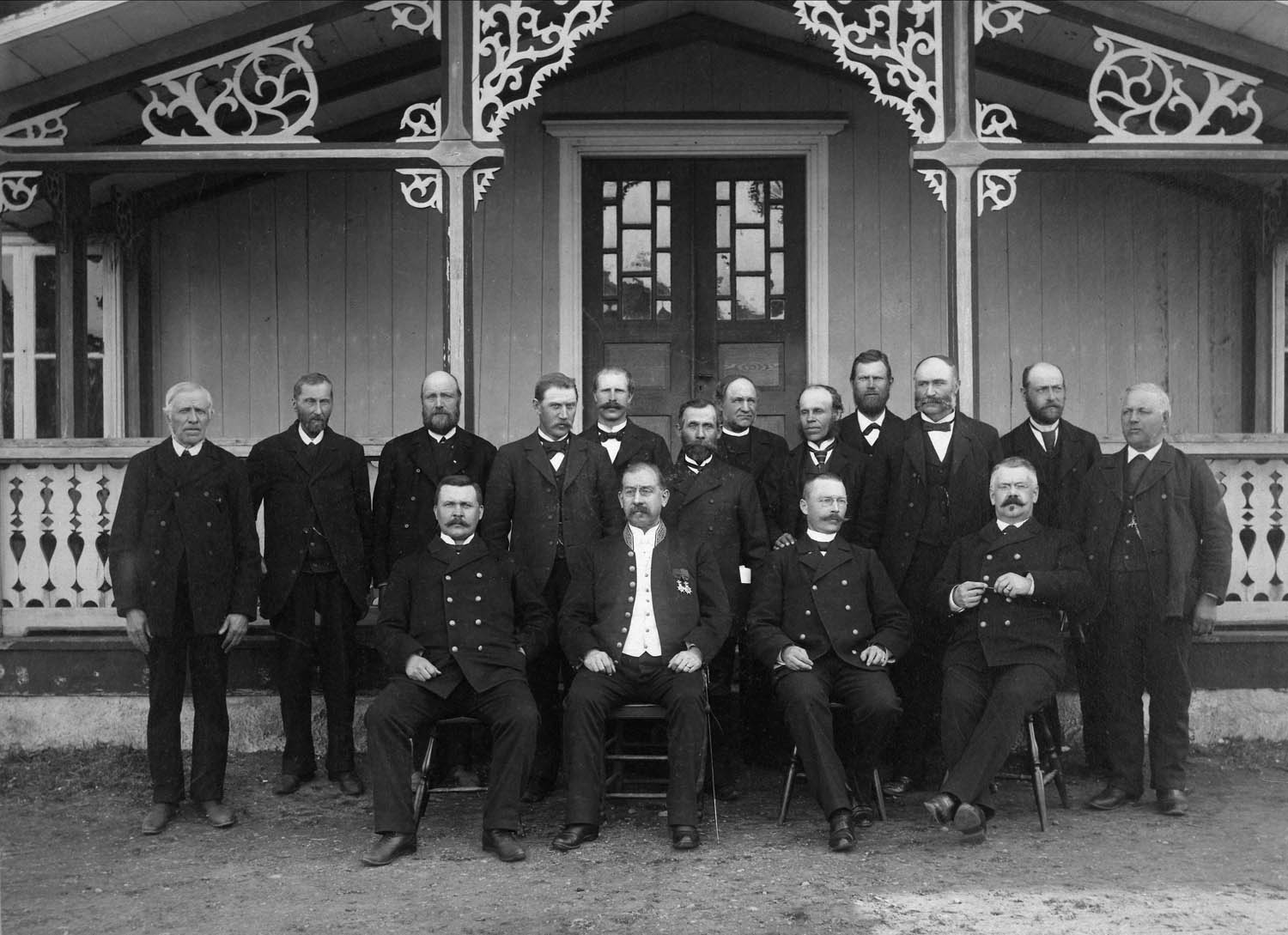 Domare, länsmän och nämndemän samlade utanför tingshuset för Västra härads domsaga. Kornstad, Småland.